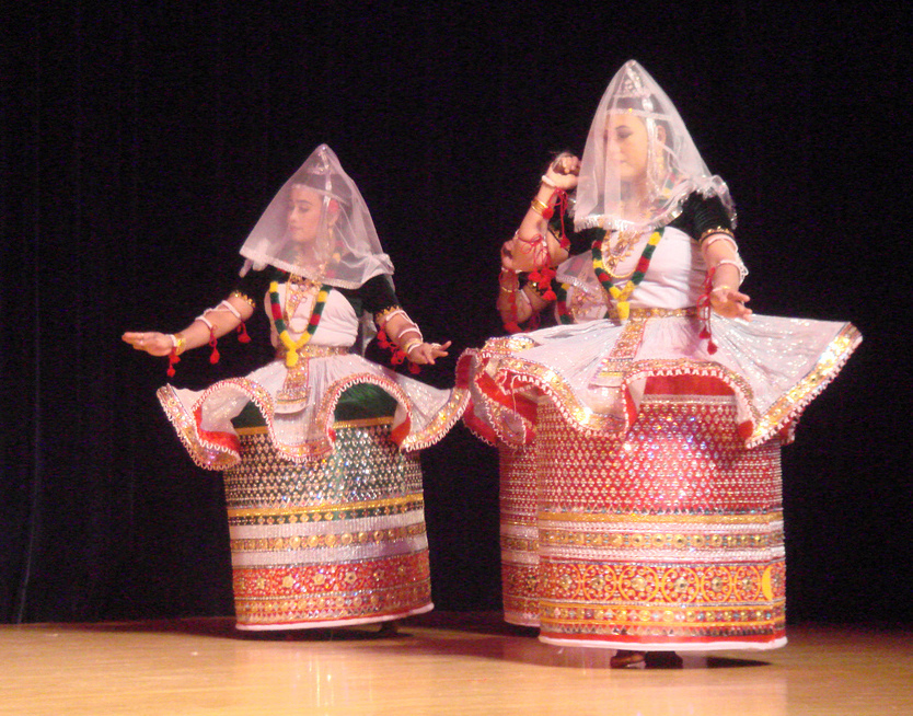 Manipuri Dance